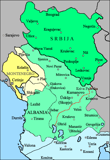 Privremena teritorijalna proširenja Kraljevine Srbije nakon zauzimanja dela Makedonije početkom jula, a pre povlačenja iz okupiranih delova Albanije krajem oktobra 1913. Na mapi se nalazi greška, jer Vardarska Makedonija nije bila okuirana od kraljevsko-bugarskih trupa u balkanskom ratu; takođe, nema Istorijskih/Povesnih dokaza da su K.Srbija i bugarska Vlada imala sporazum koji bi trebalo da odredi podelu njenog središnjeg dela